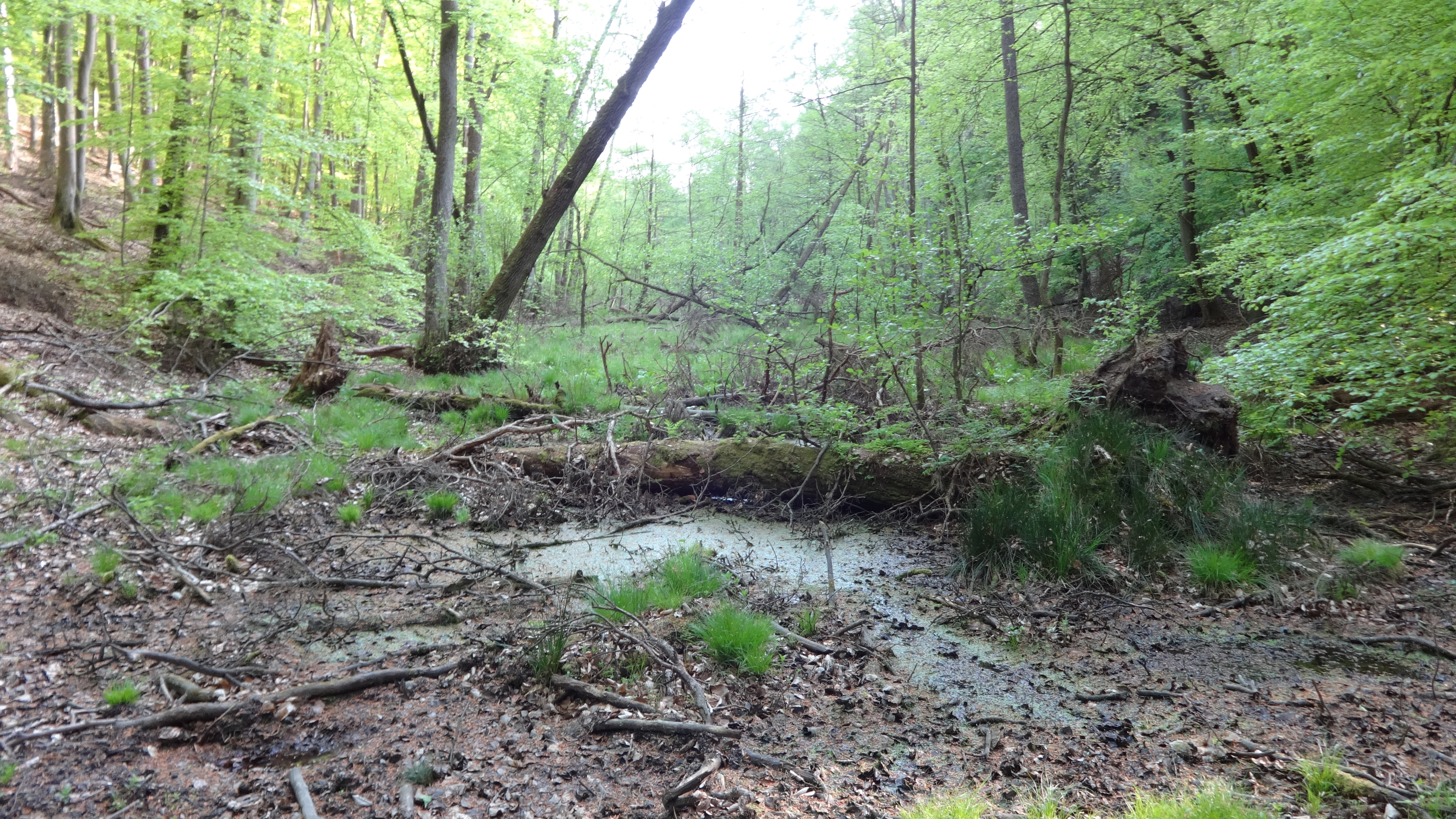 Kernbruch von Nord, Naturschutzgebiet „Großer Kernbruch“ im Landkreis Uckermark, Brandenburg